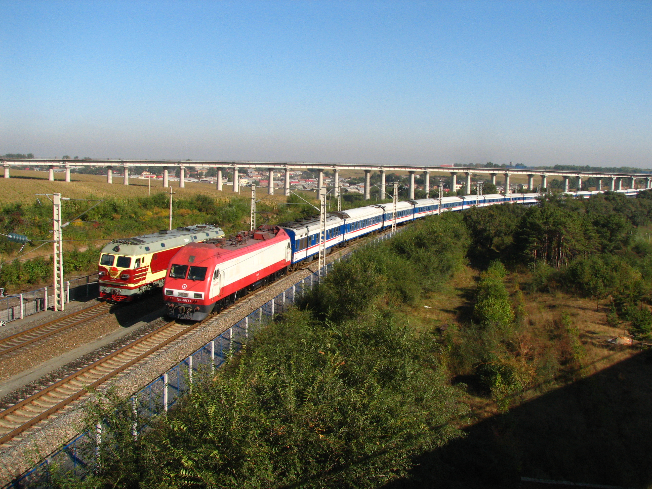 巡道工出品 Photo by Xundaogong T184和据说车上坐着刘志军的DF4D会车